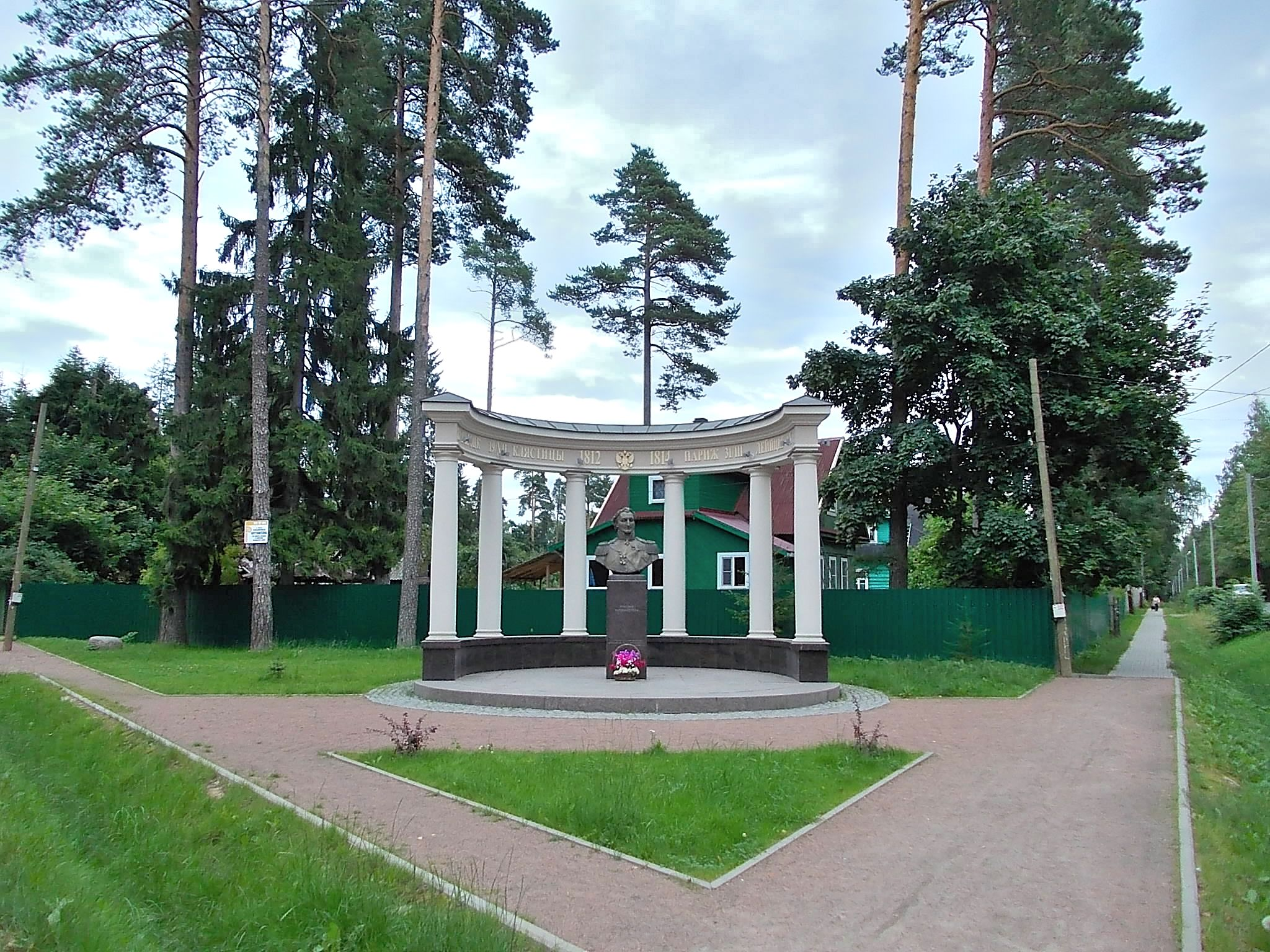 Памятник в п. Сиверский